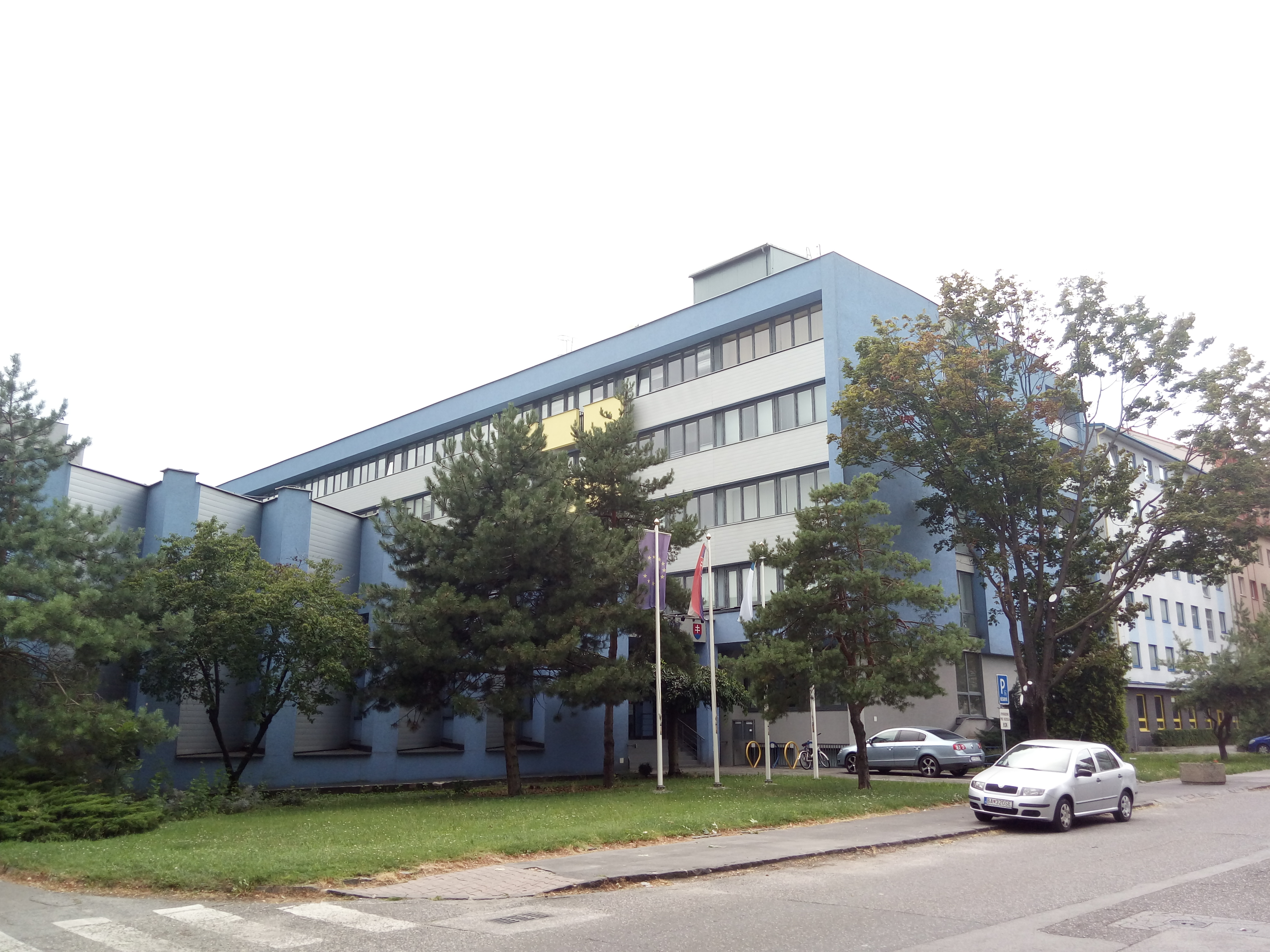 Sabinovská 17, Ružinov, Bratislava